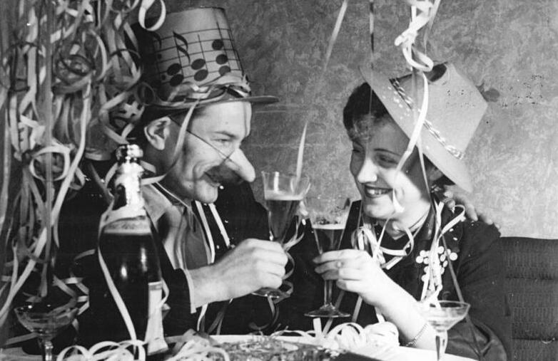 Neujahrsfest Zentralbild Krueger 29.12.1953 Str.-Ho. Silvester 1953. Ein Prosit auf das neue Jahr! Information added by Wikimedia users.